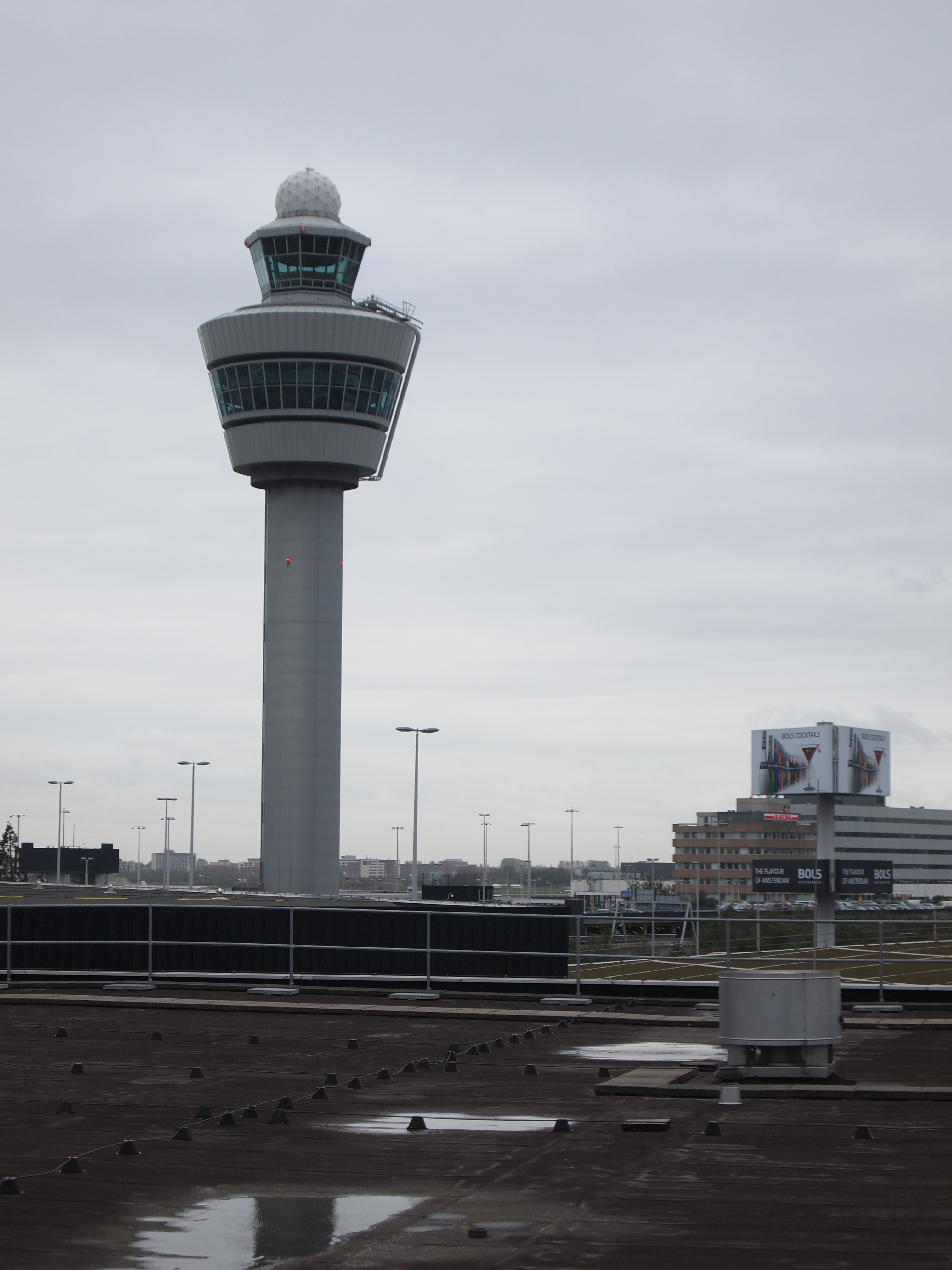 Verkeerstoren van de Luchthaven Schiphol